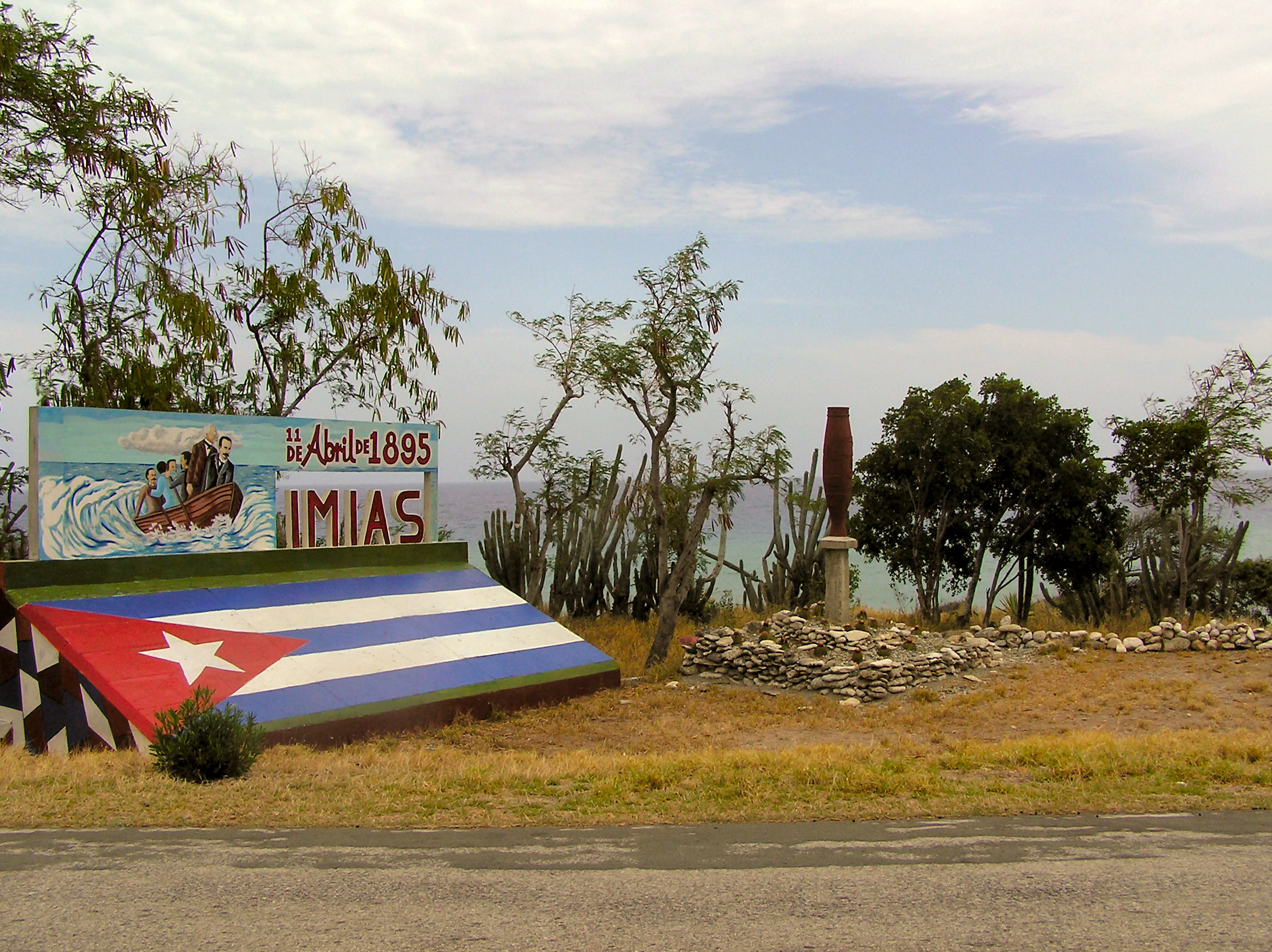 Monument commémoratif du débarquement, le 11 avril 1895, de José Martí près de Imias (Province de Guantanamo) au sud de Cuba